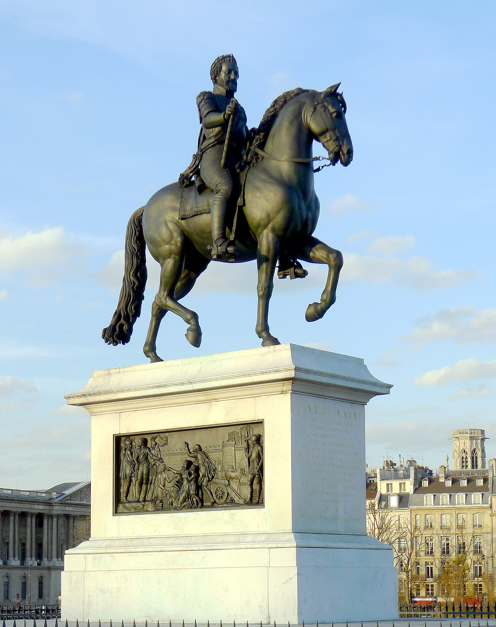 Statue équestre d'Henri-IV sur le pont-Neuf - Paris Ier